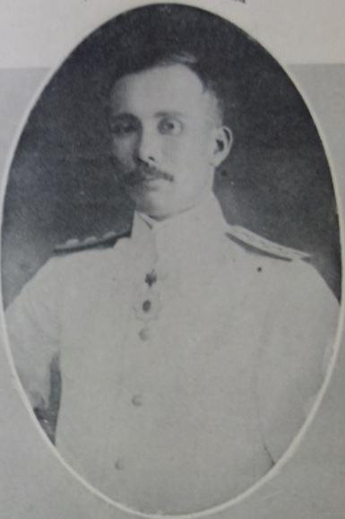 春日(装甲巡洋艦)艦長寺岡平吾大佐：1919年8月5日 - 1920年11月20日